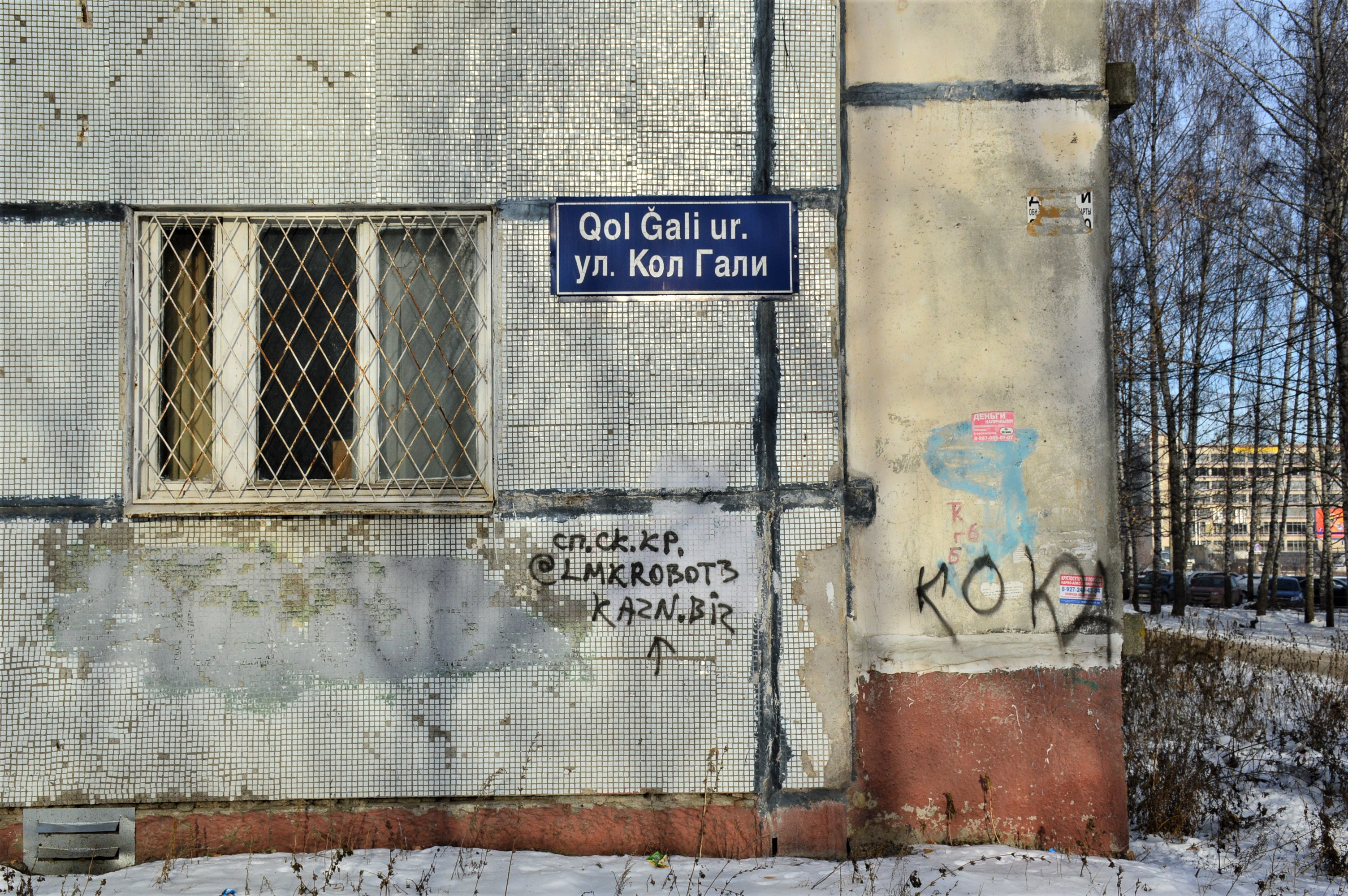 Казань, Горки. Табличка на доме 15/21 по улице Кул Гали